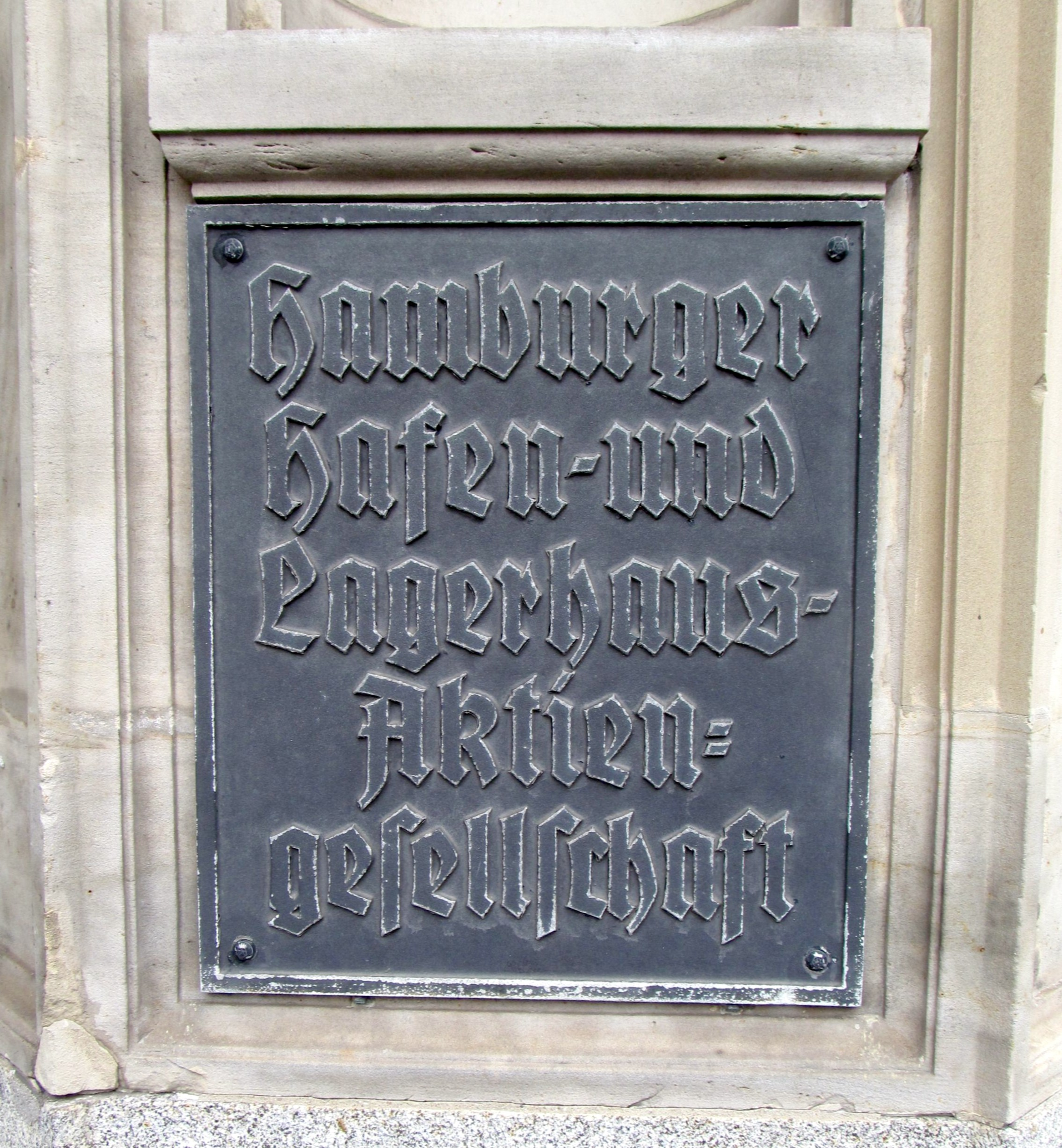 Hamburger Hafen- und Lagerhaus-AG, Eingangsschild am sog. "Speicherstadtradthaus" in der Hamburger Speicherstadt, Bei St. Annen 1